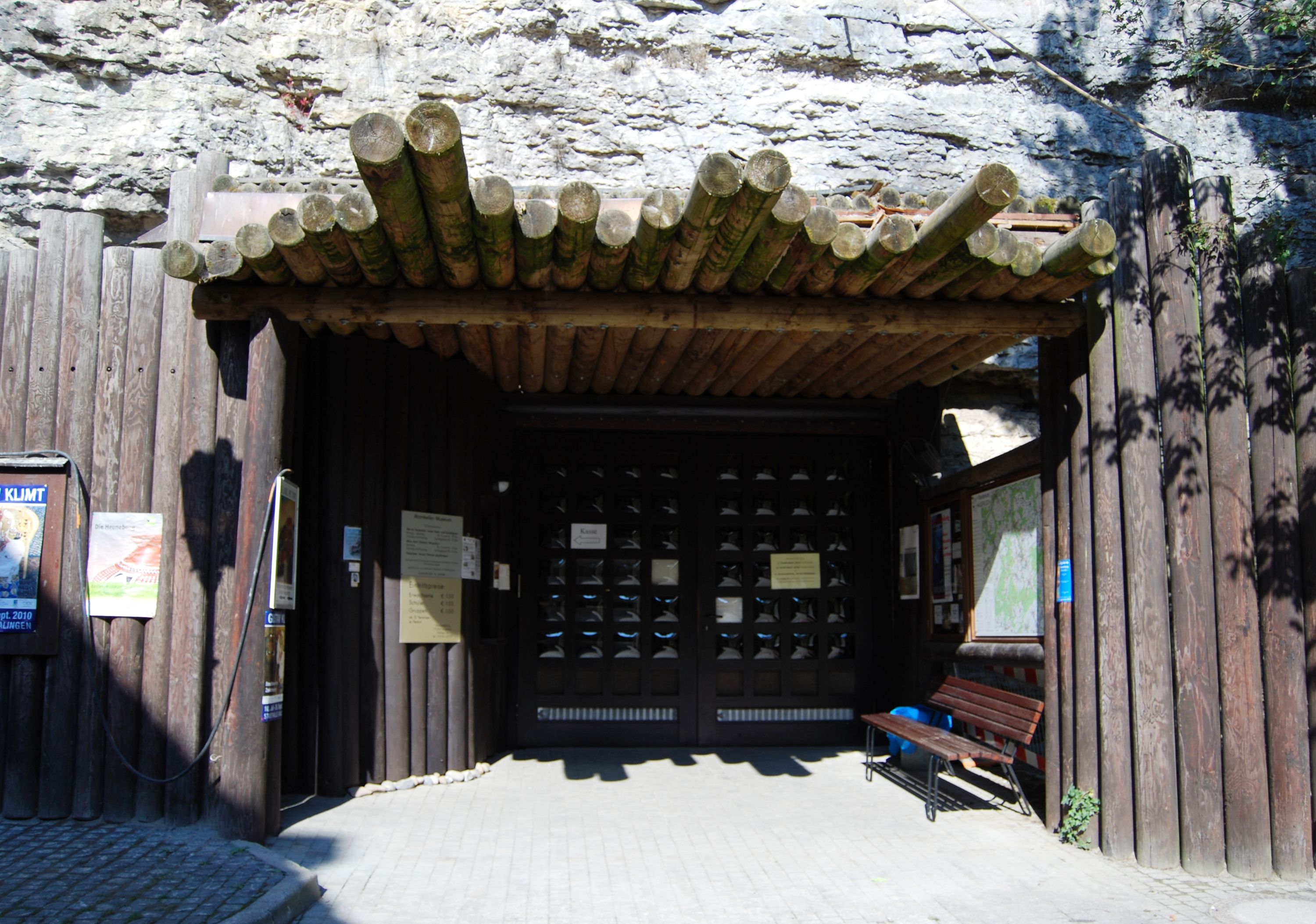 Eingang zum Atomkeller in Haigerloch